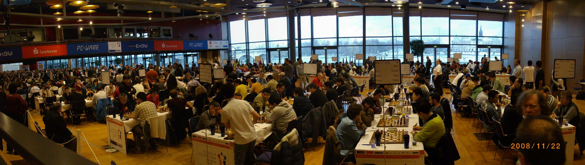 Dresden Olympiad 2008